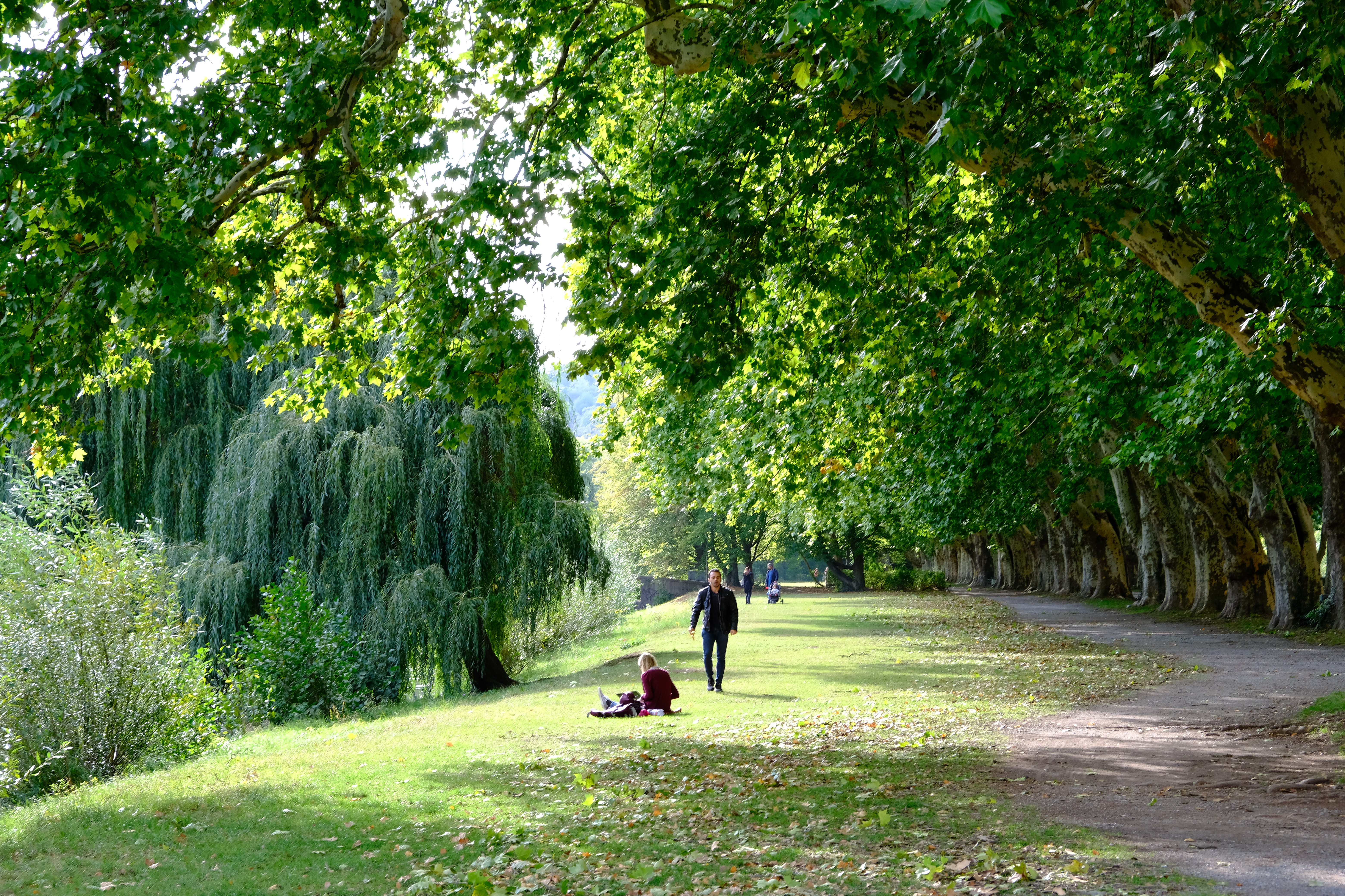 Südufer der Neckarinsel mit Platanenallee in Tübingen